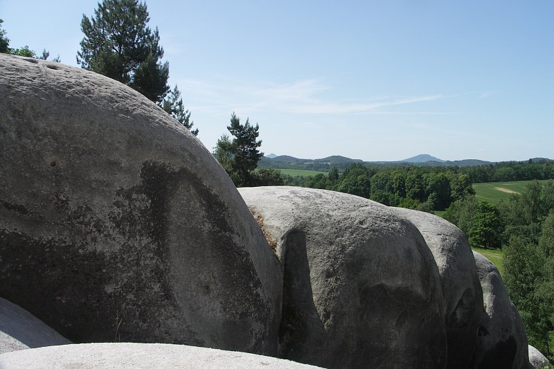 Bílé kameny, Lusatian Mountains, Czech Republic